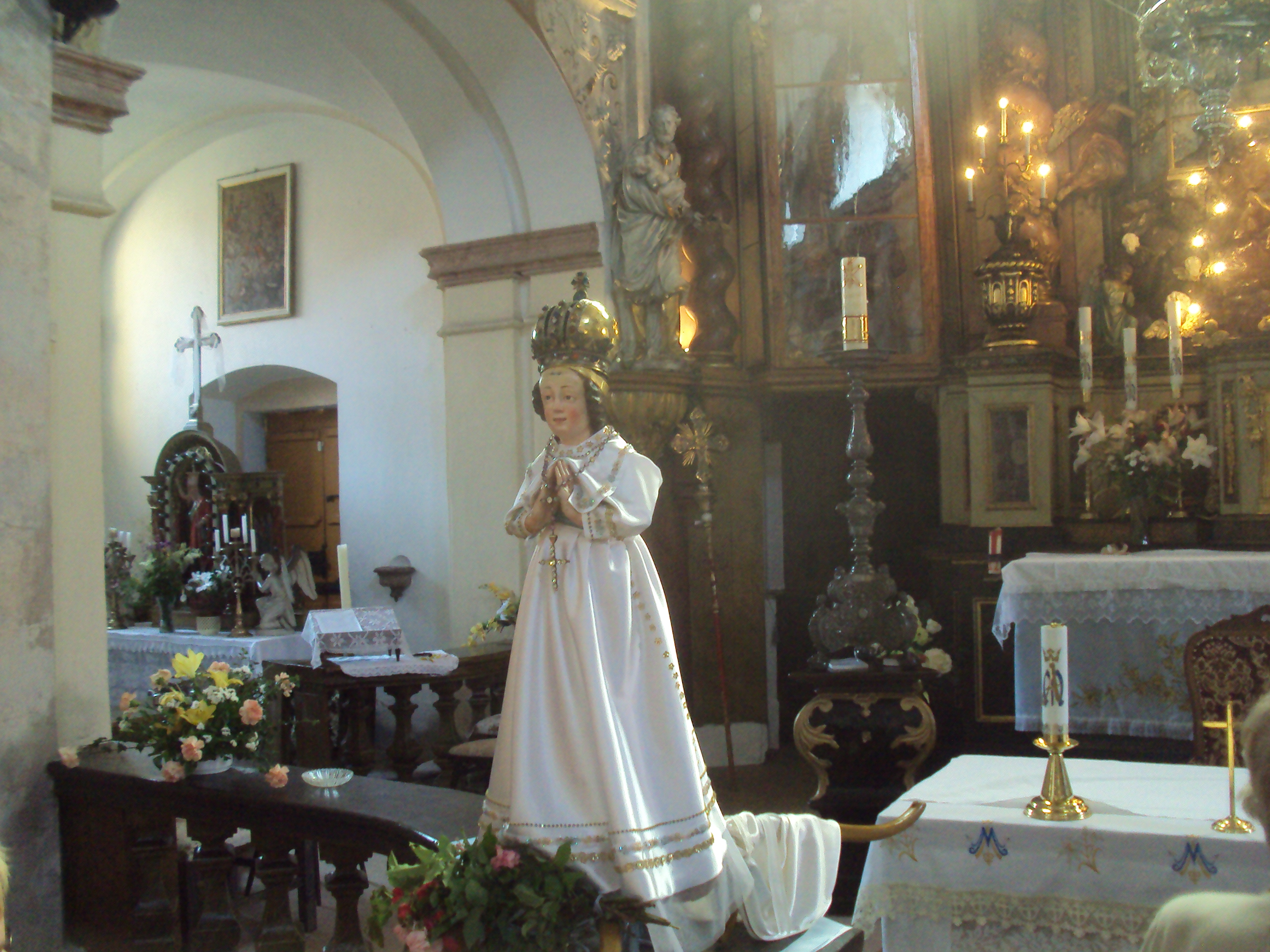 Socha P.Marie uvnitř kostela